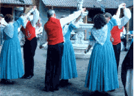 Volkspele